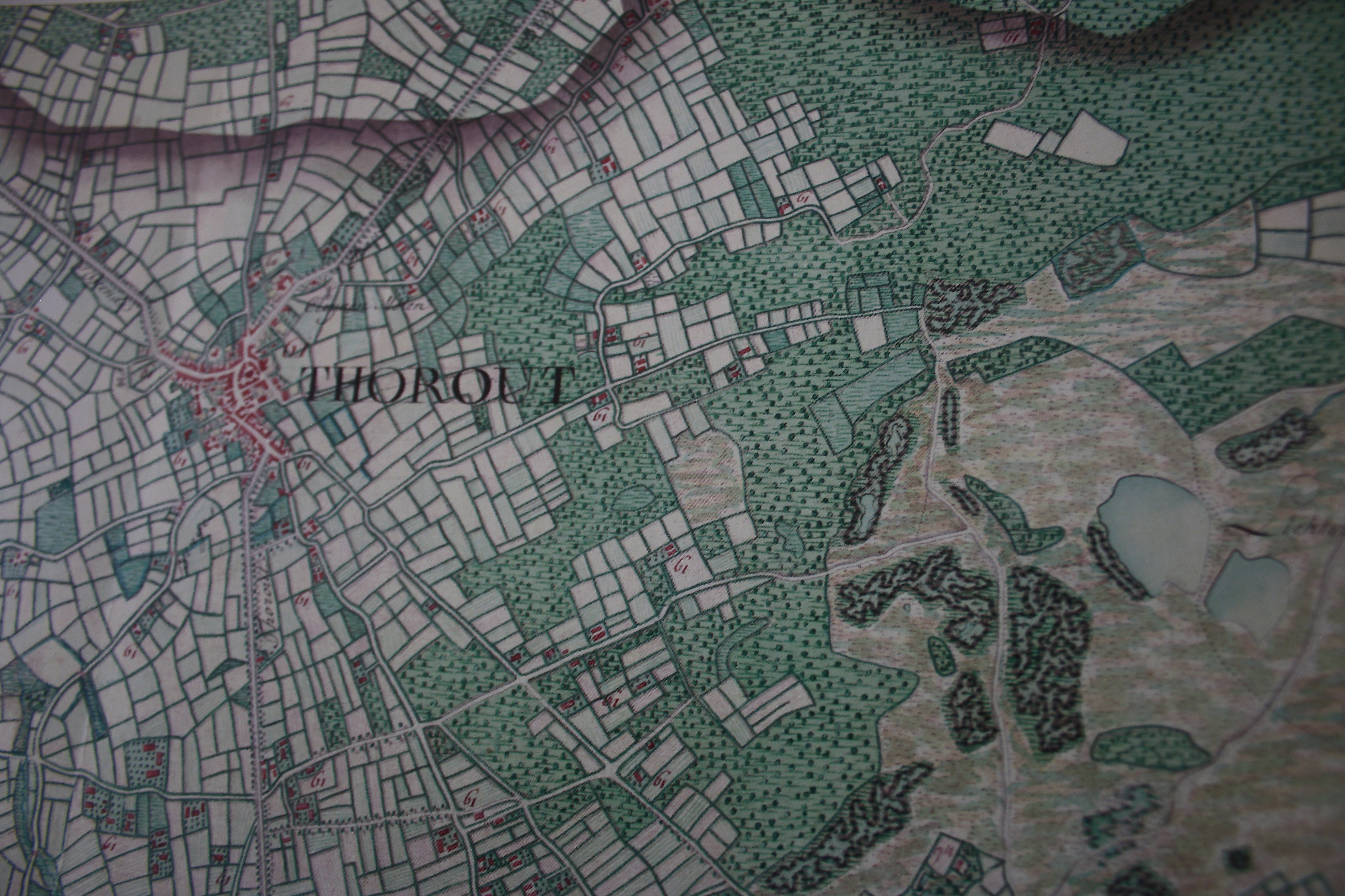 Groenhove Ferraris